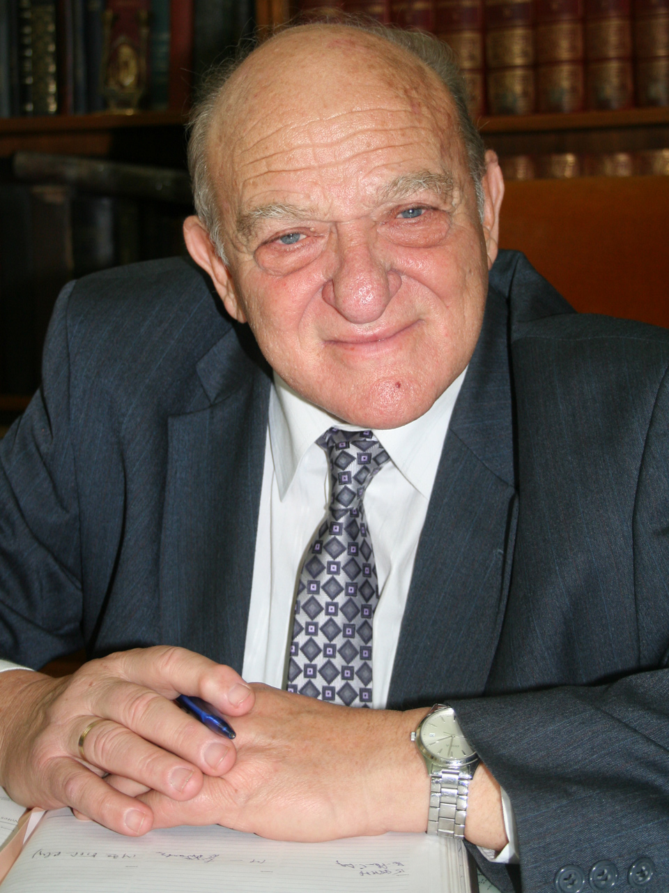 Portret Aurel Vainer